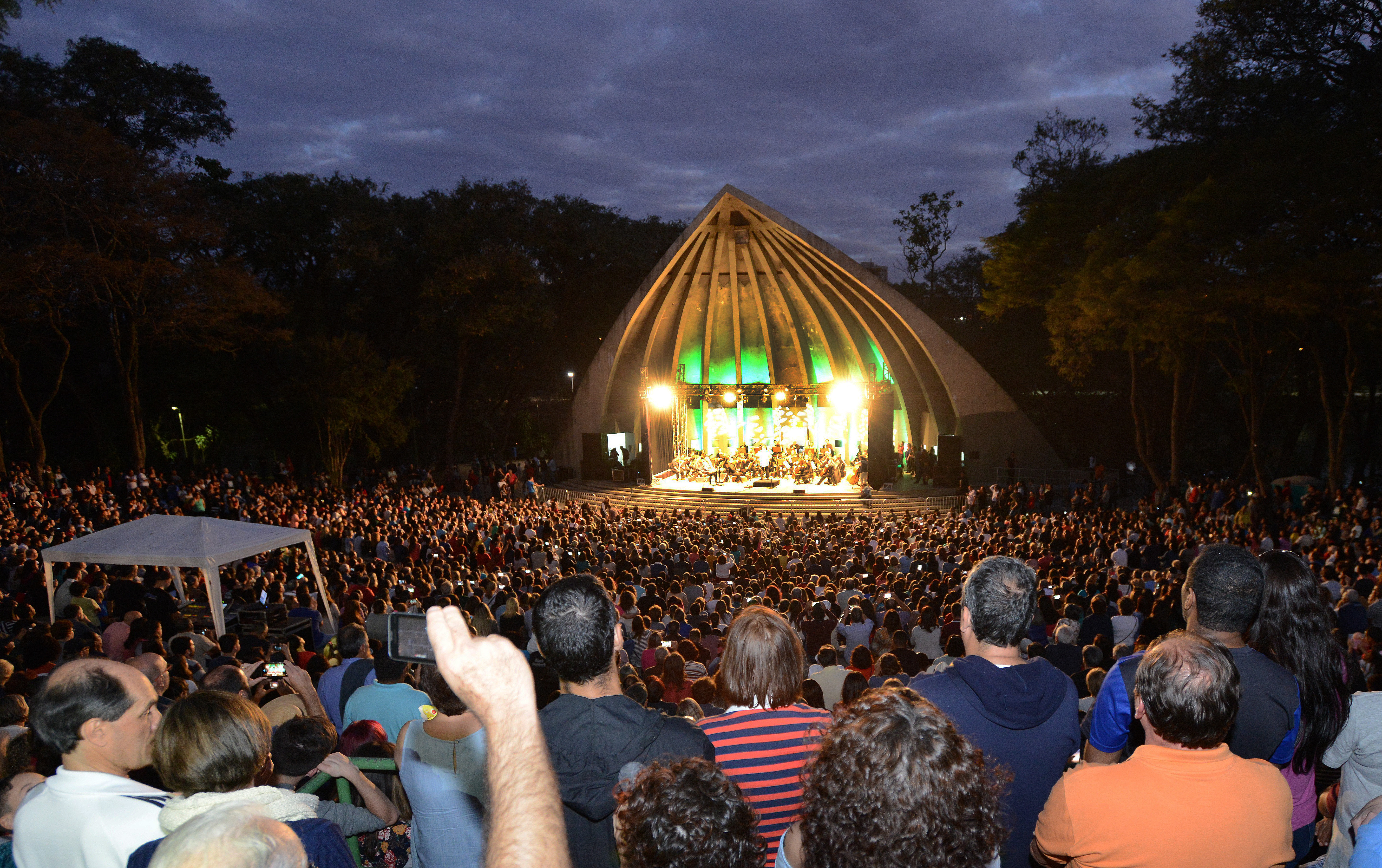 Guilherme Arantes e Orquestra Sinfônica Municipal de Campinas na Concha Acústica Foto Carlos Bassan